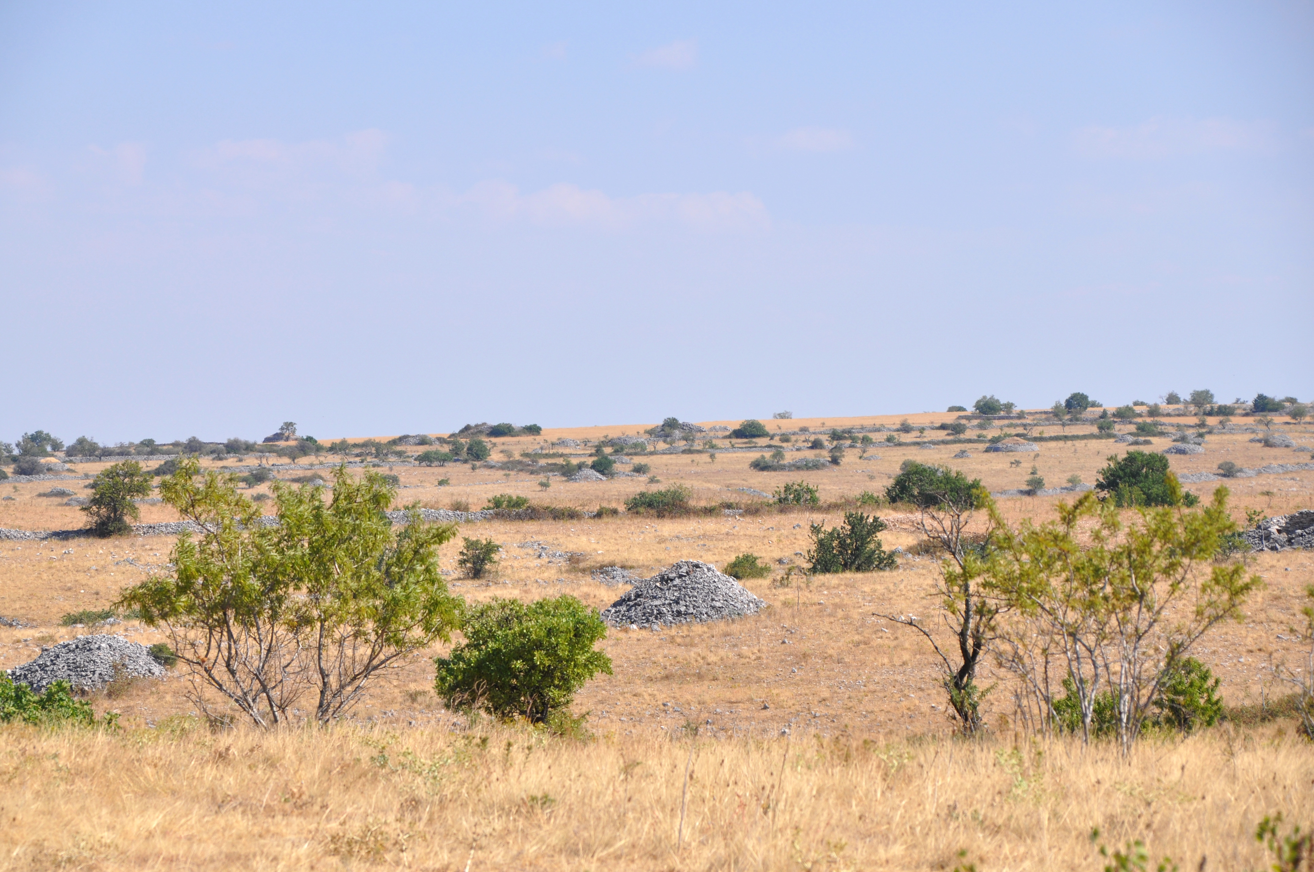 Plateau de la Murgia à Ruvo di Puglia